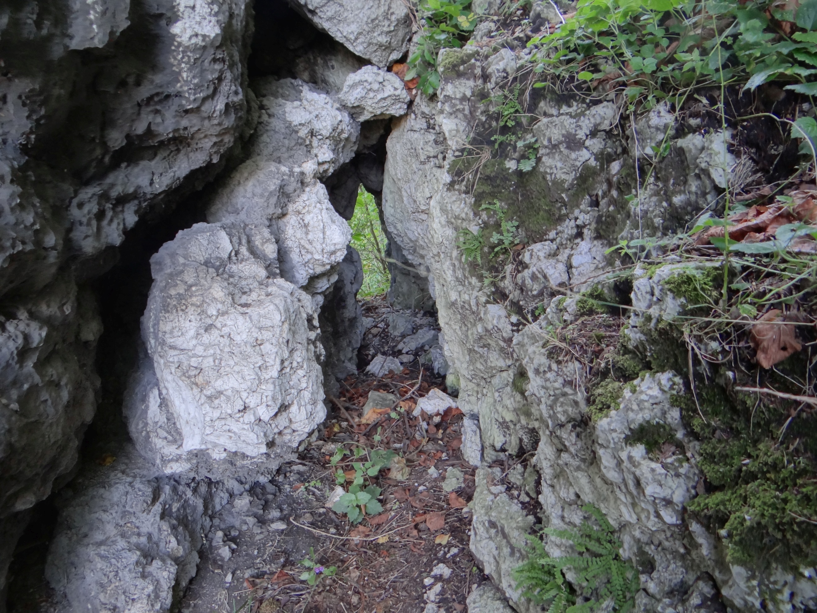 Schronisko na Półce w Igle